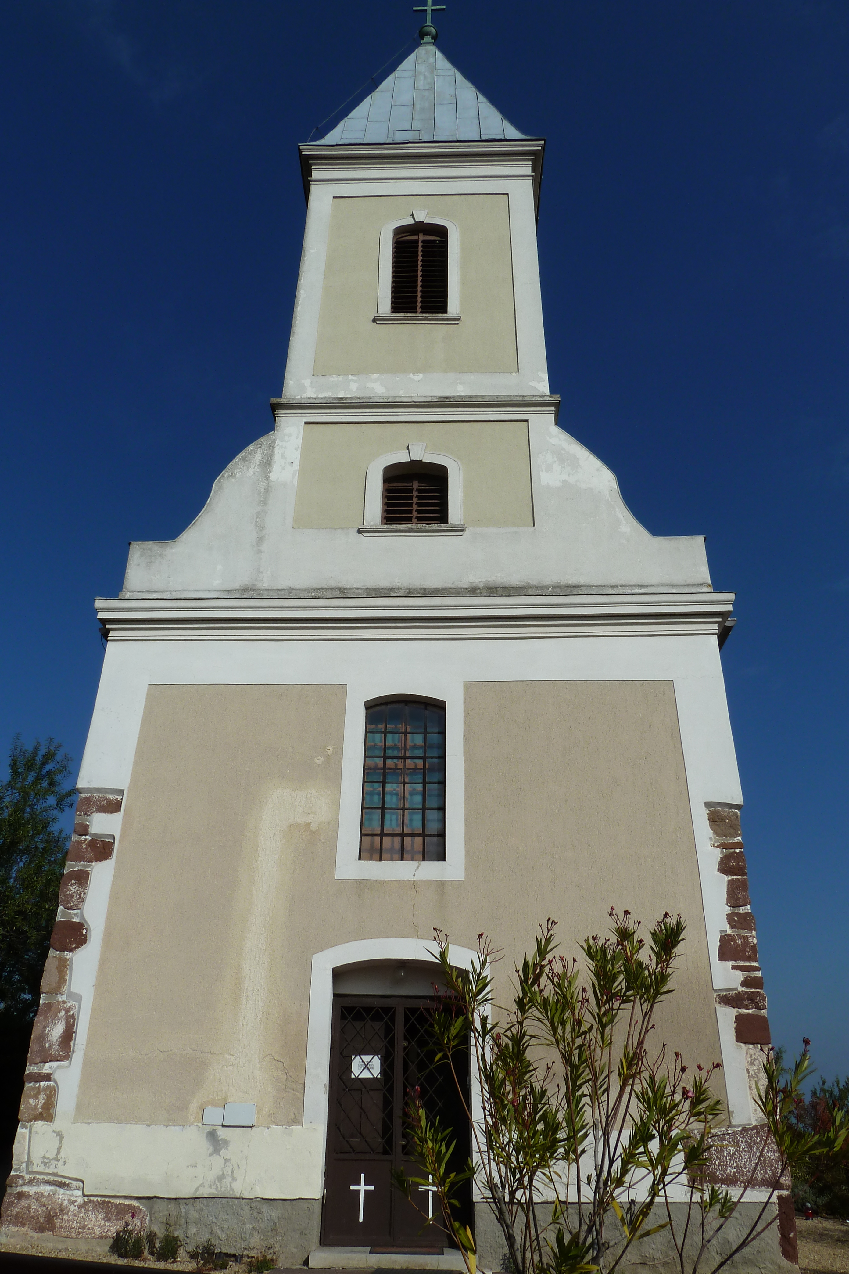 Szent István első vértanú római katolikus templom (Paloznak, Kossuth utca)